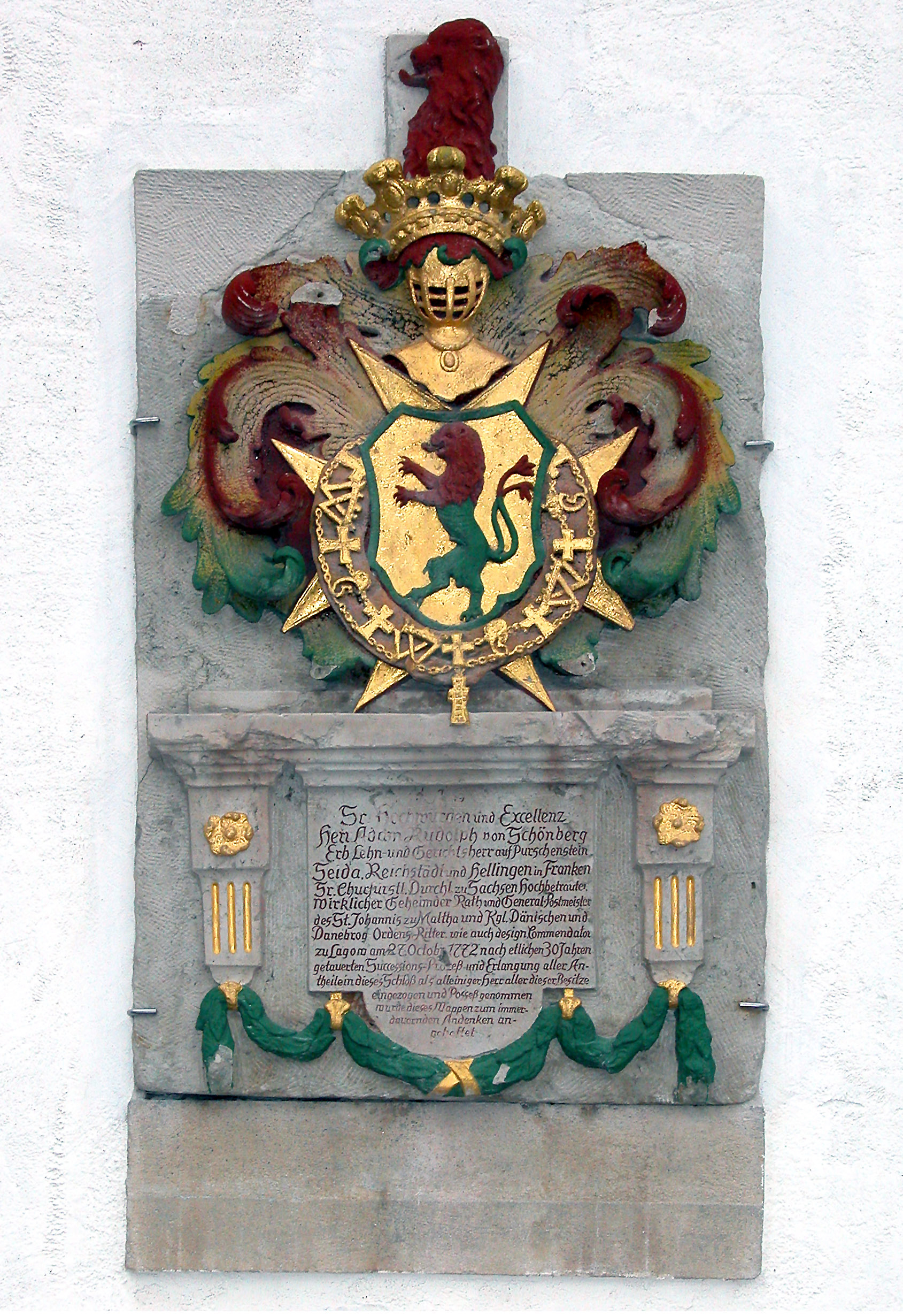 14.04.2006 09544 Neuhausen/Erzgeb., Purschenstein 1 (GMP: 50.676317,13.463421): Schloß Purschenstein. Die Tafel an der Nordwand zum Schloßhof erinnert an den Erwerb des Schlosses durch Adam Rudolph von Schönberg 1772. [DSCN9427.TIF]20060414035DR.JPG(c)Blobelt